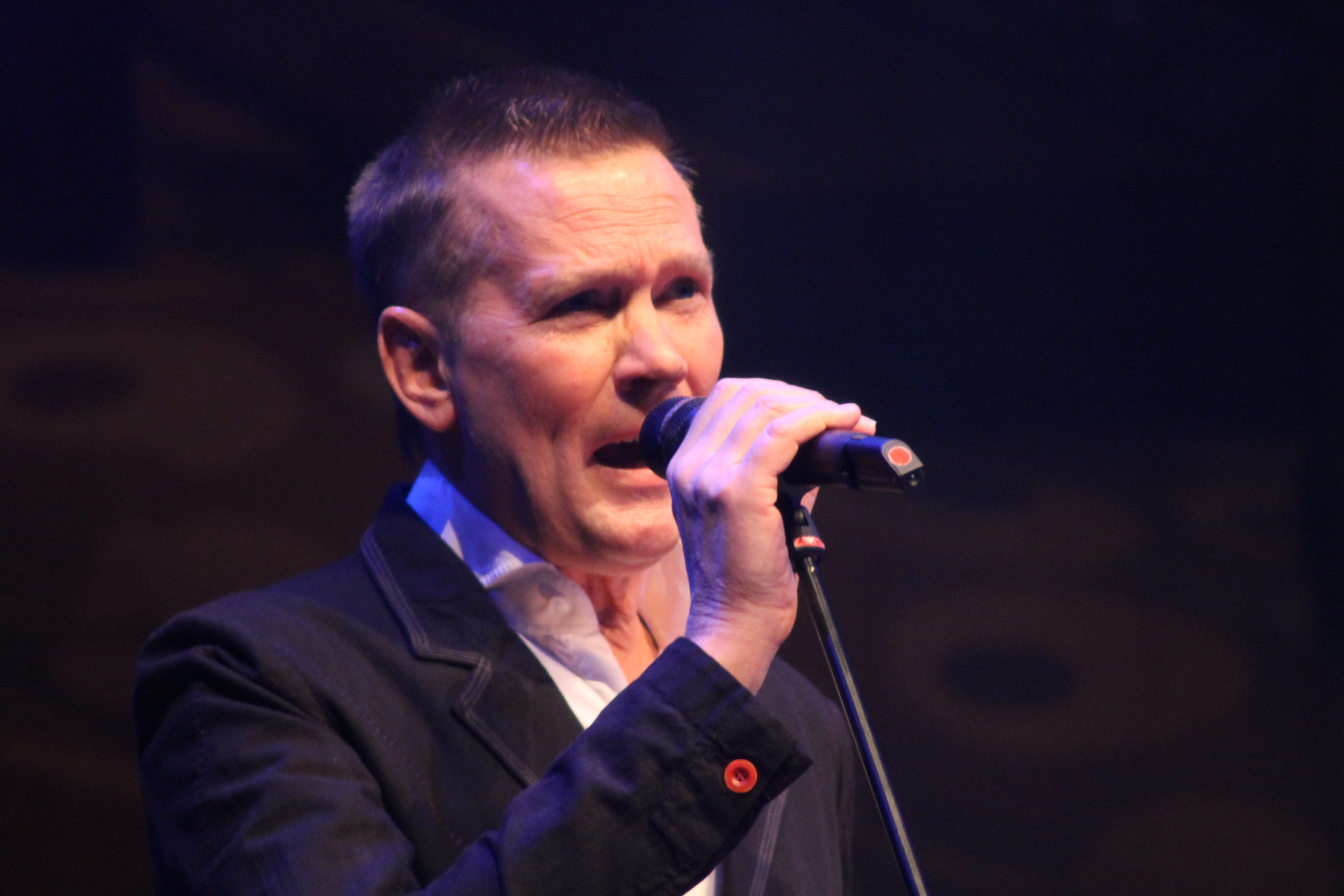 Jaap de Witte bij de afscheidstour 'Bronnen' in Eindhoven